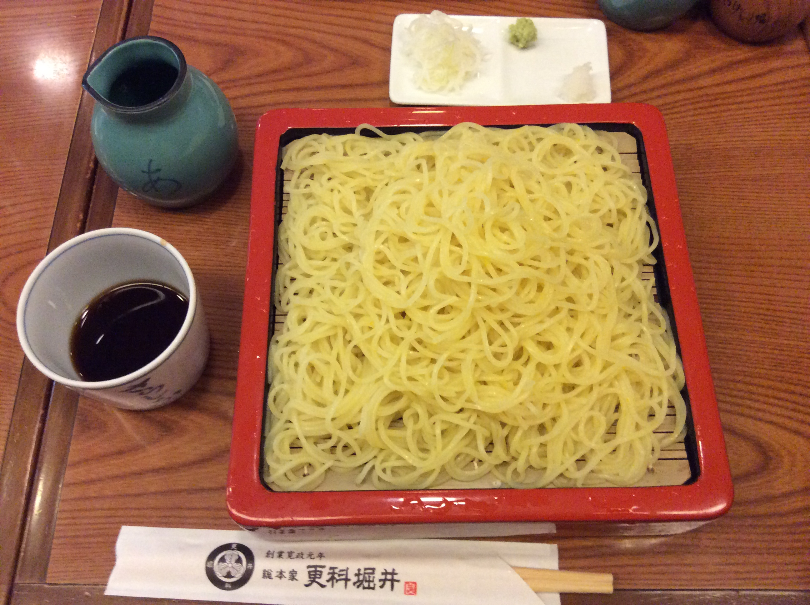 麻布十番 更科堀井